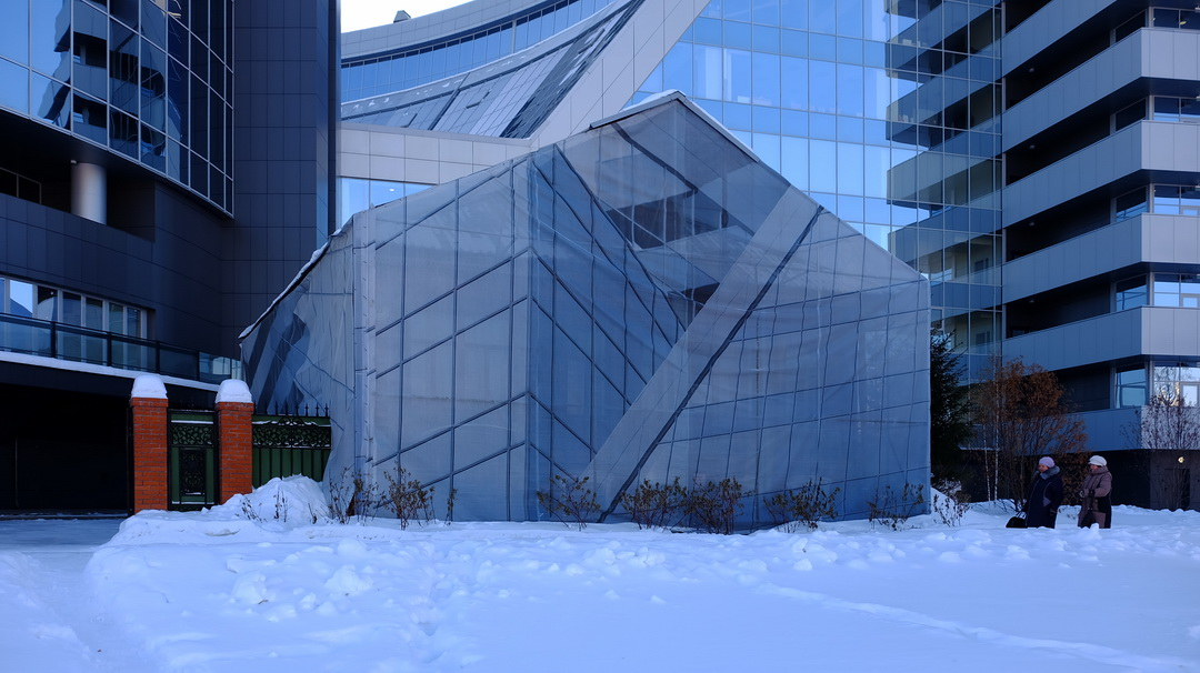 т.н Дом Гайдара в Екатеринбурге, скрытый под баннером, установленным перед открытием Ельцин-центра